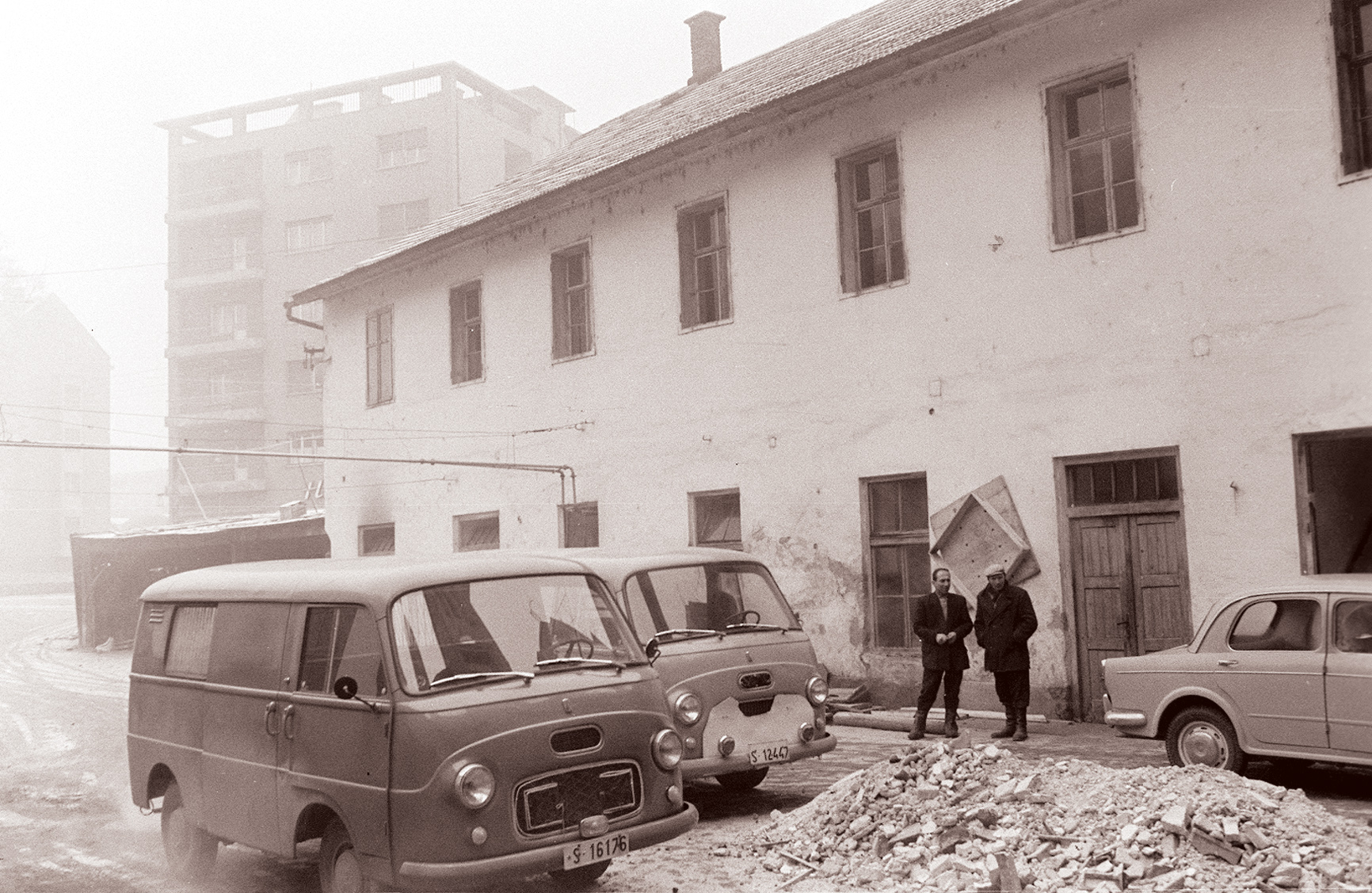 Stari prostori Mariborske mlekarne ob Kopitarjevi ulici